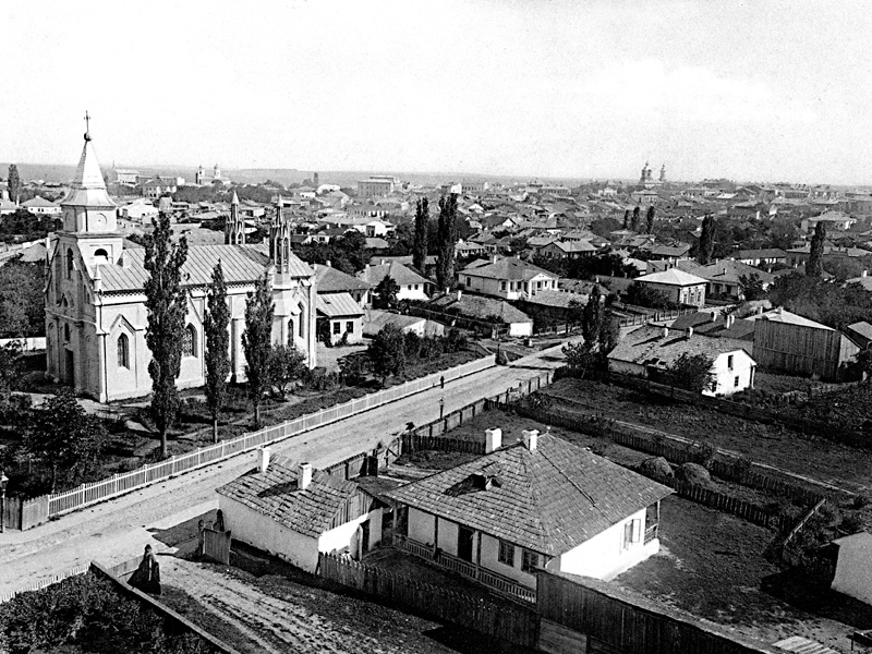 Botoşani